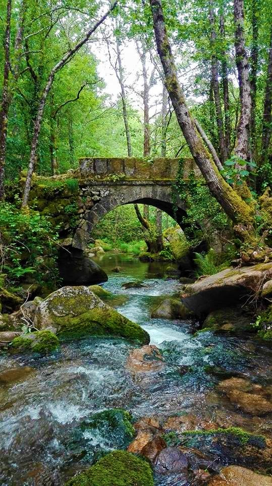 Ponte románica de Freáns